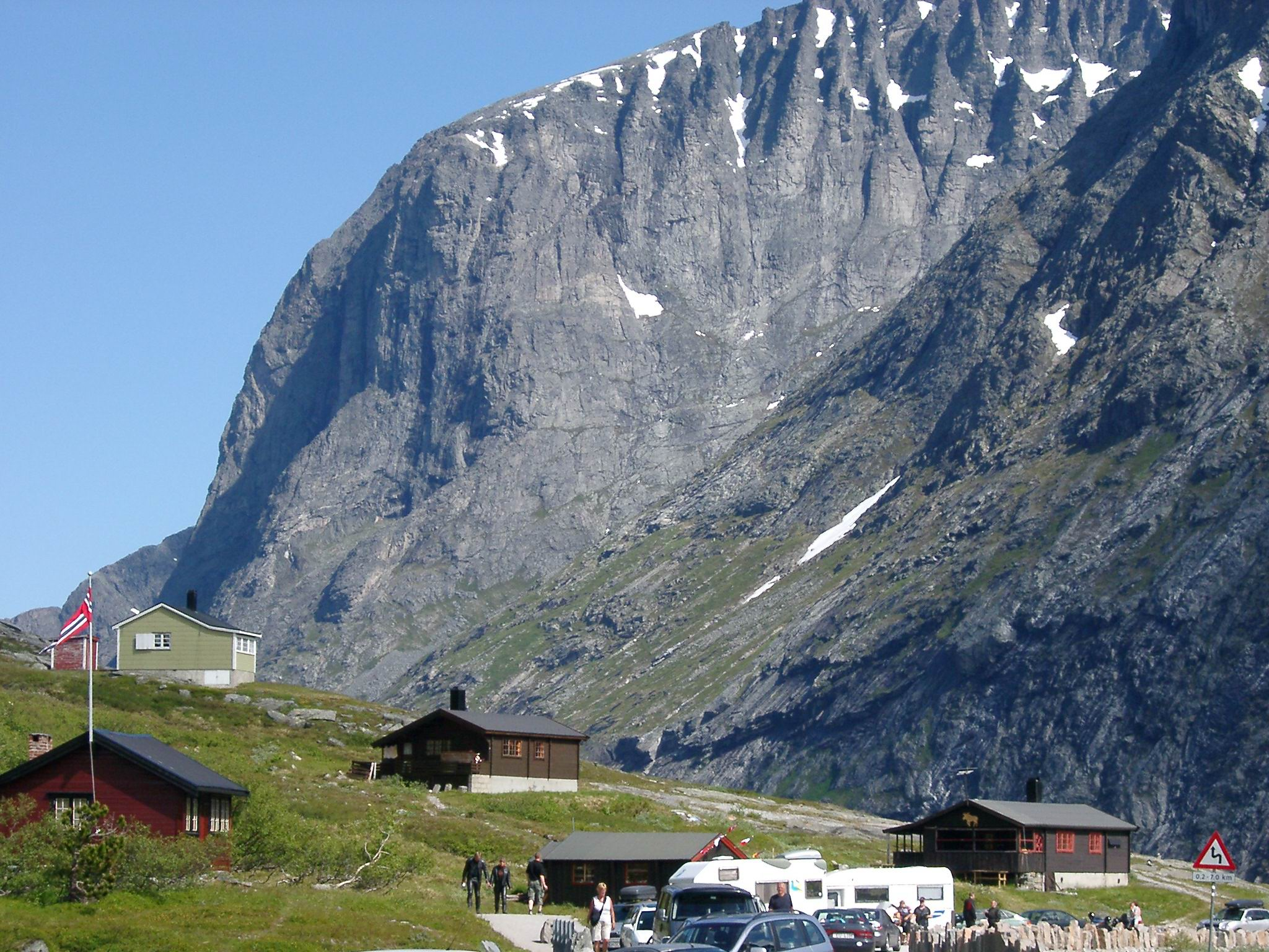 Trollstigen Norwegen